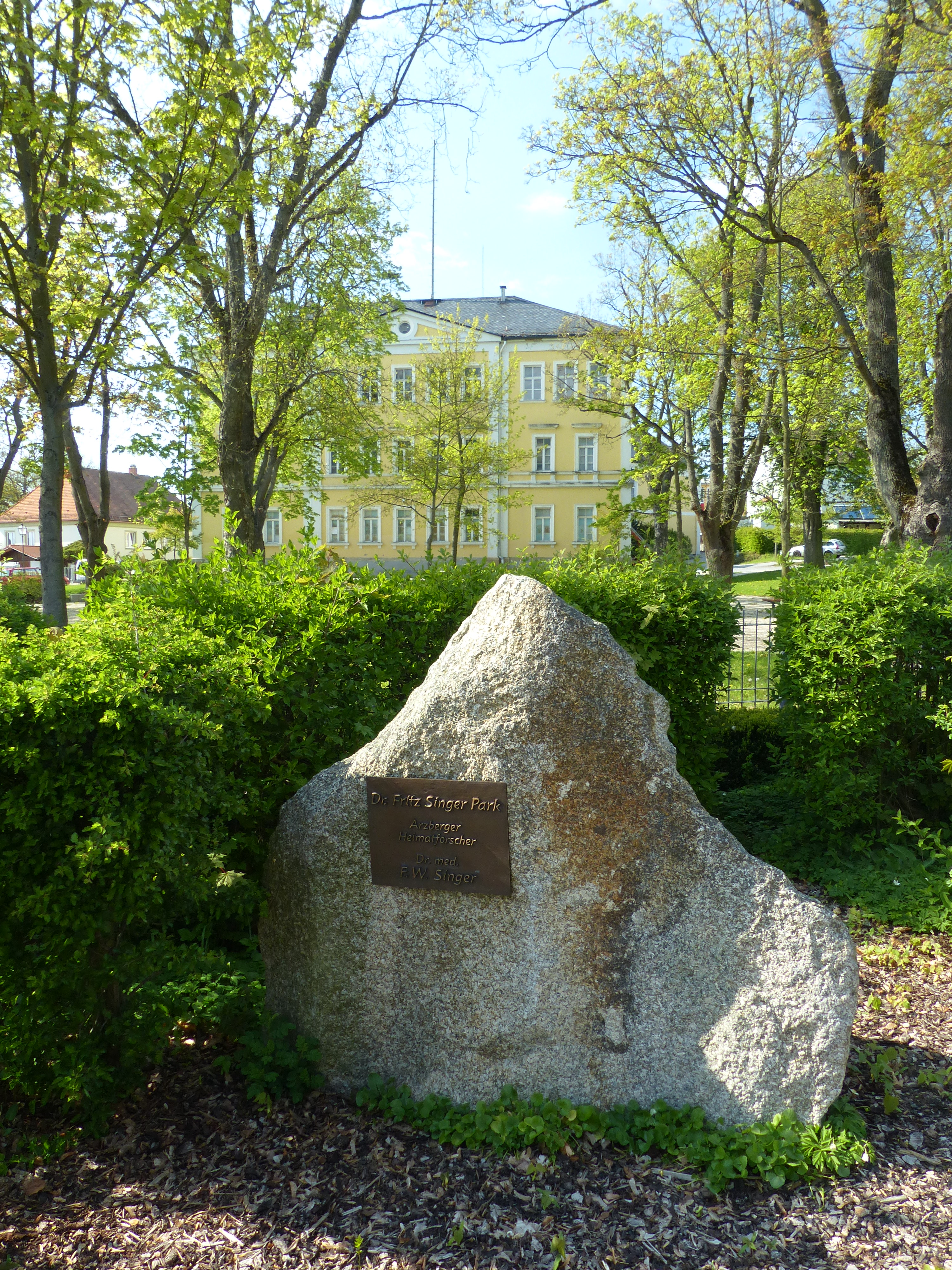 Humboldtweg Arzberg